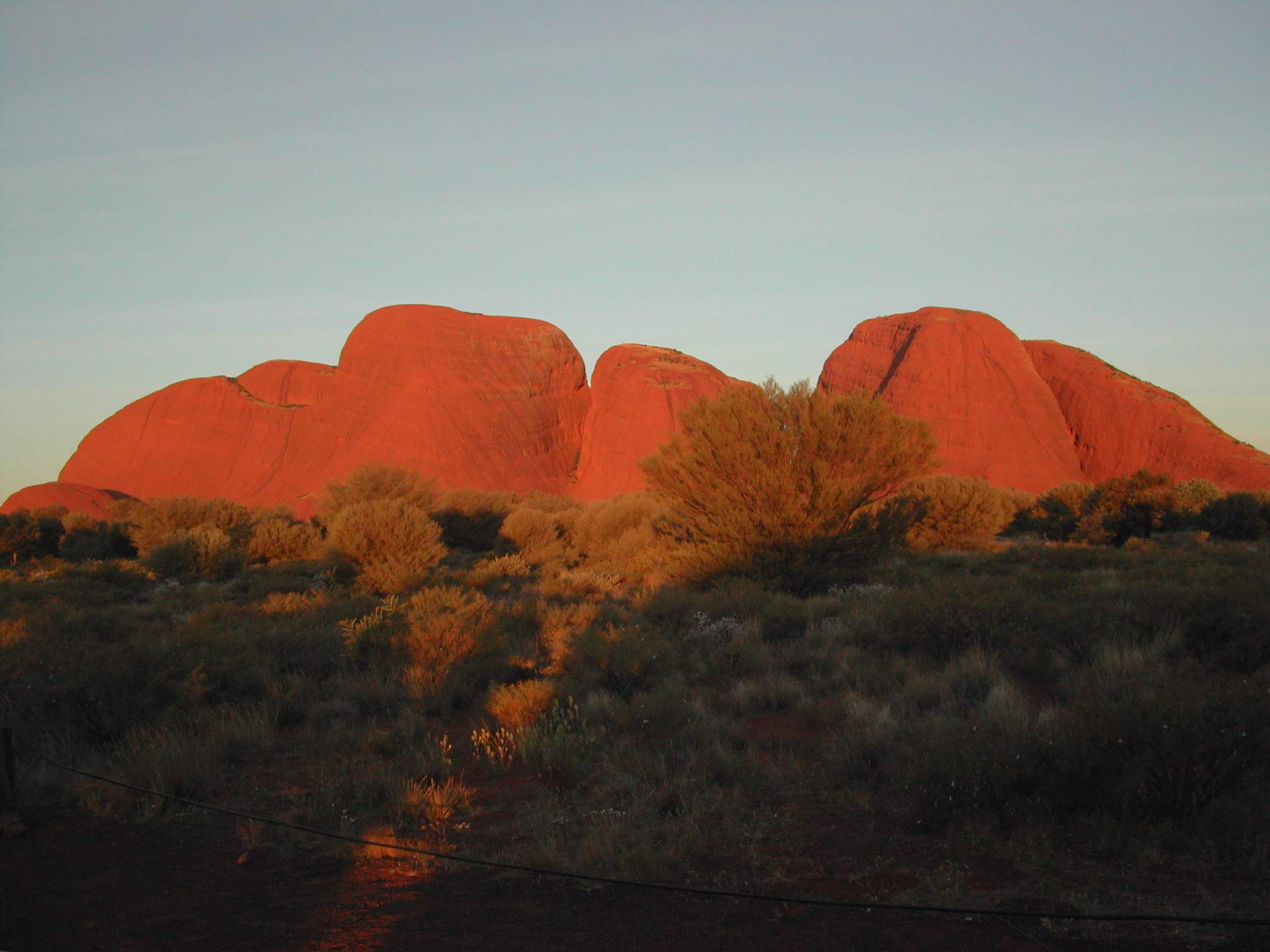 Kata Tjuta.